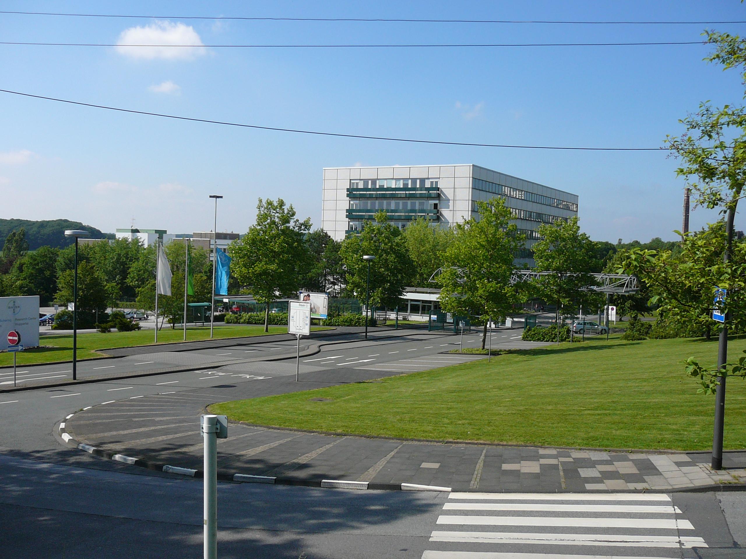 Forschungszentrum Bayer HealthCare AG, Aprather Weg, Wuppertal